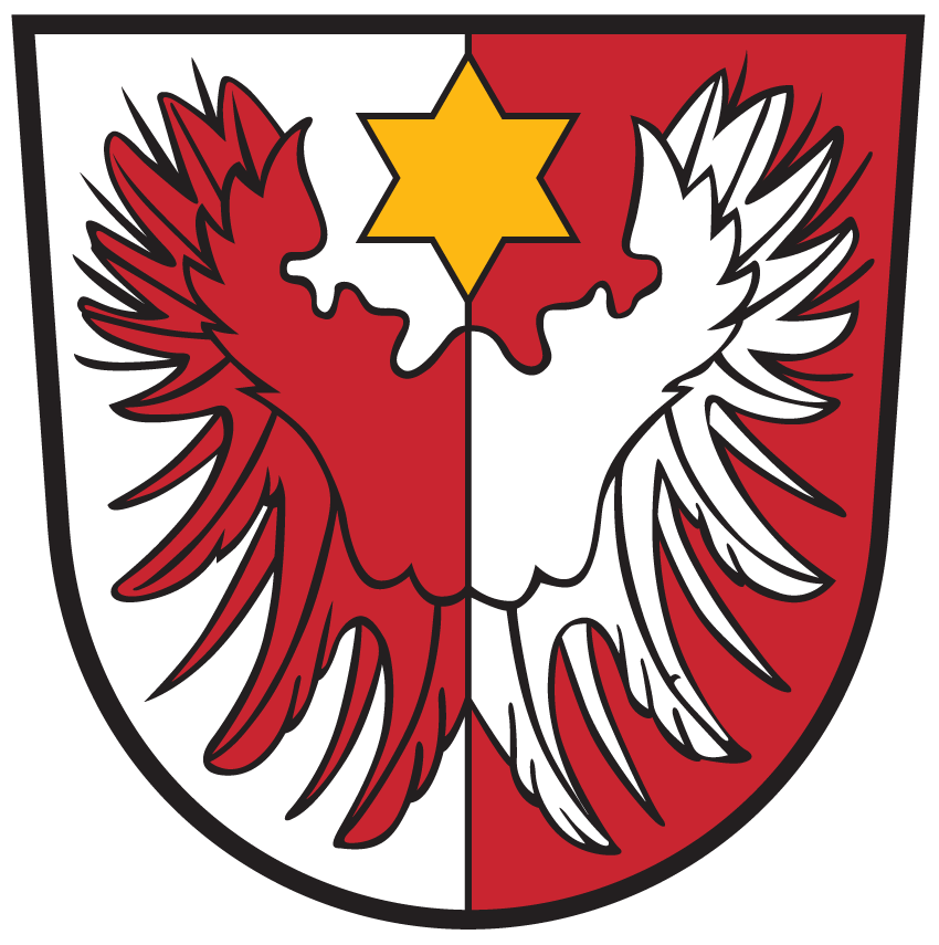 Wappen von Spittal an der Drau